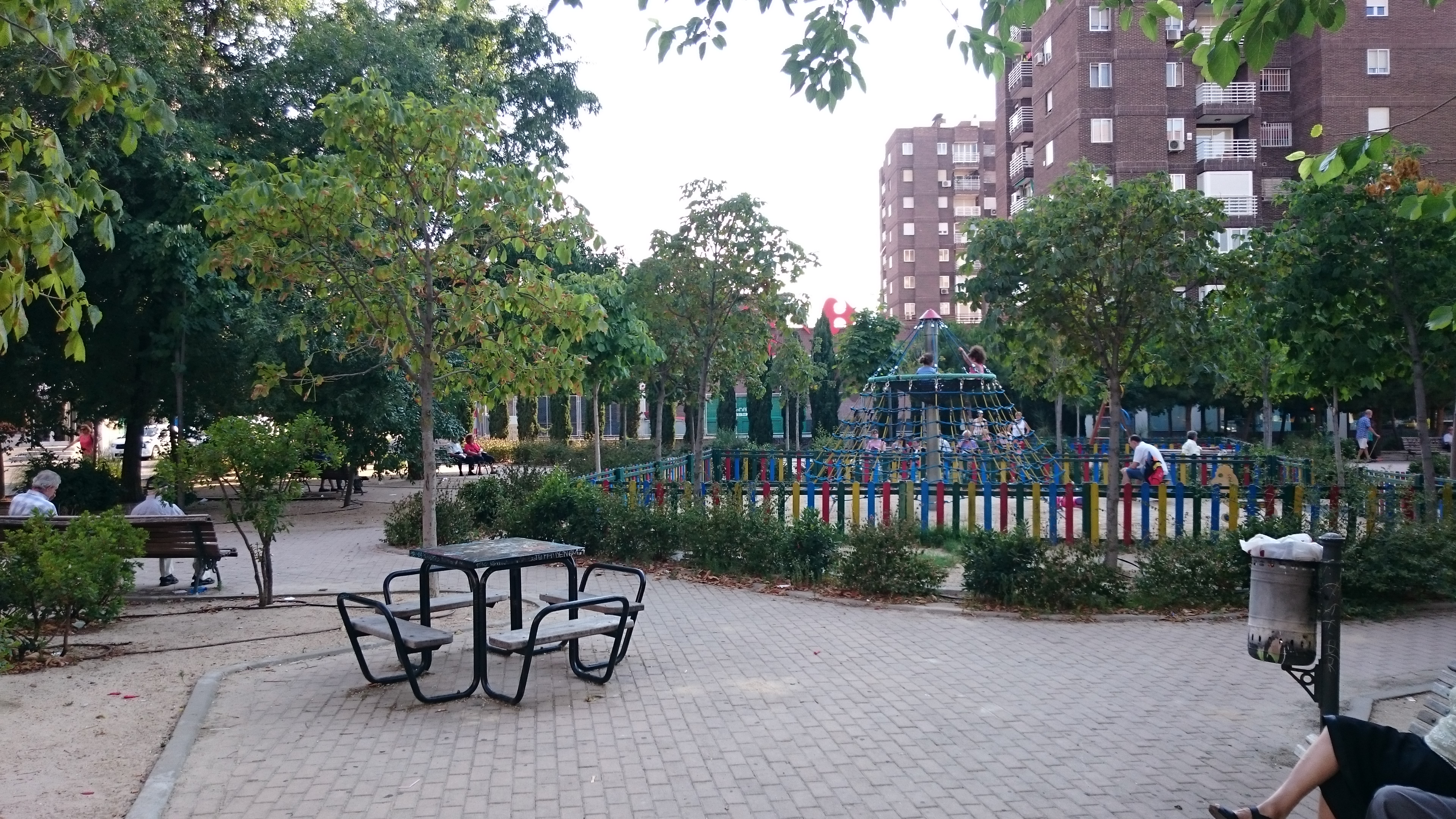 Jardines de Yolanda González, en la esquina de las calles Seseña y Escalona. El Pleno de la Junta de Gobierno de la ciudad de Madrid, a propuesta del pleno de la Junta Municipal del distrito de Latina aprobó por unanimidad el 10 de febrero de 2015, bautizar este espacio con el nombre de Jardines de Yolanda González Martín.